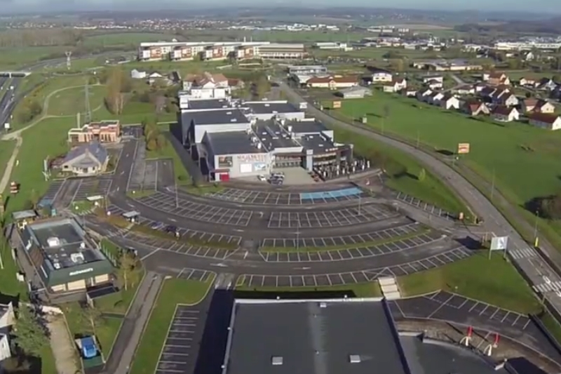 Masjestic Vesoul